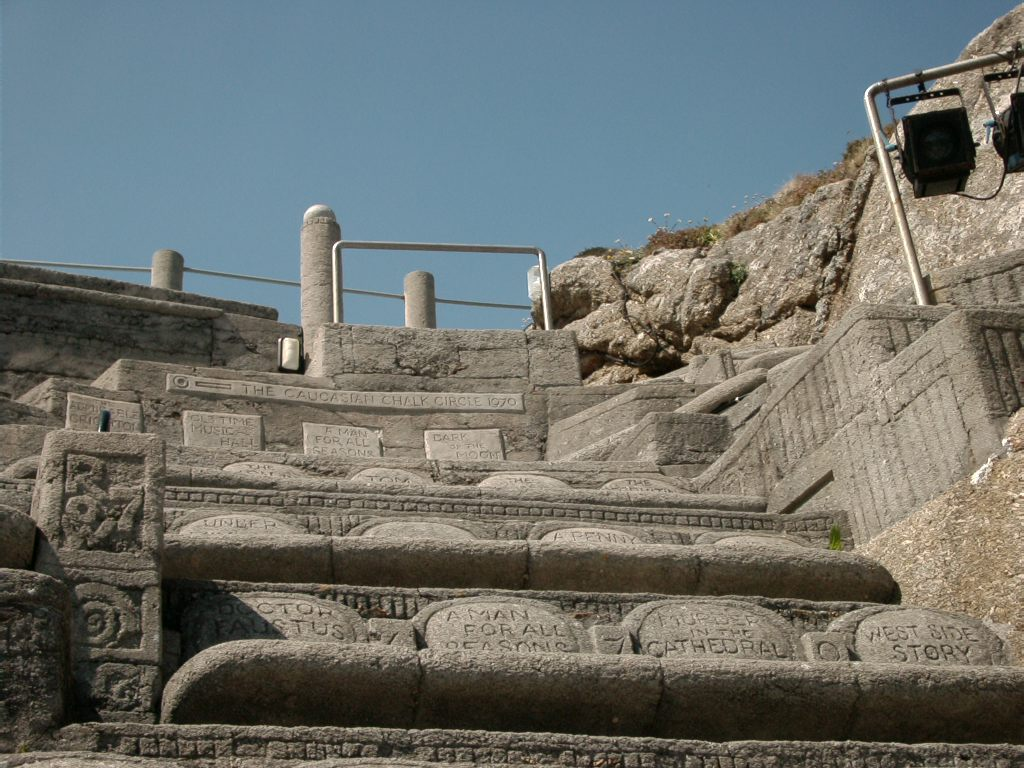 Beschreibung